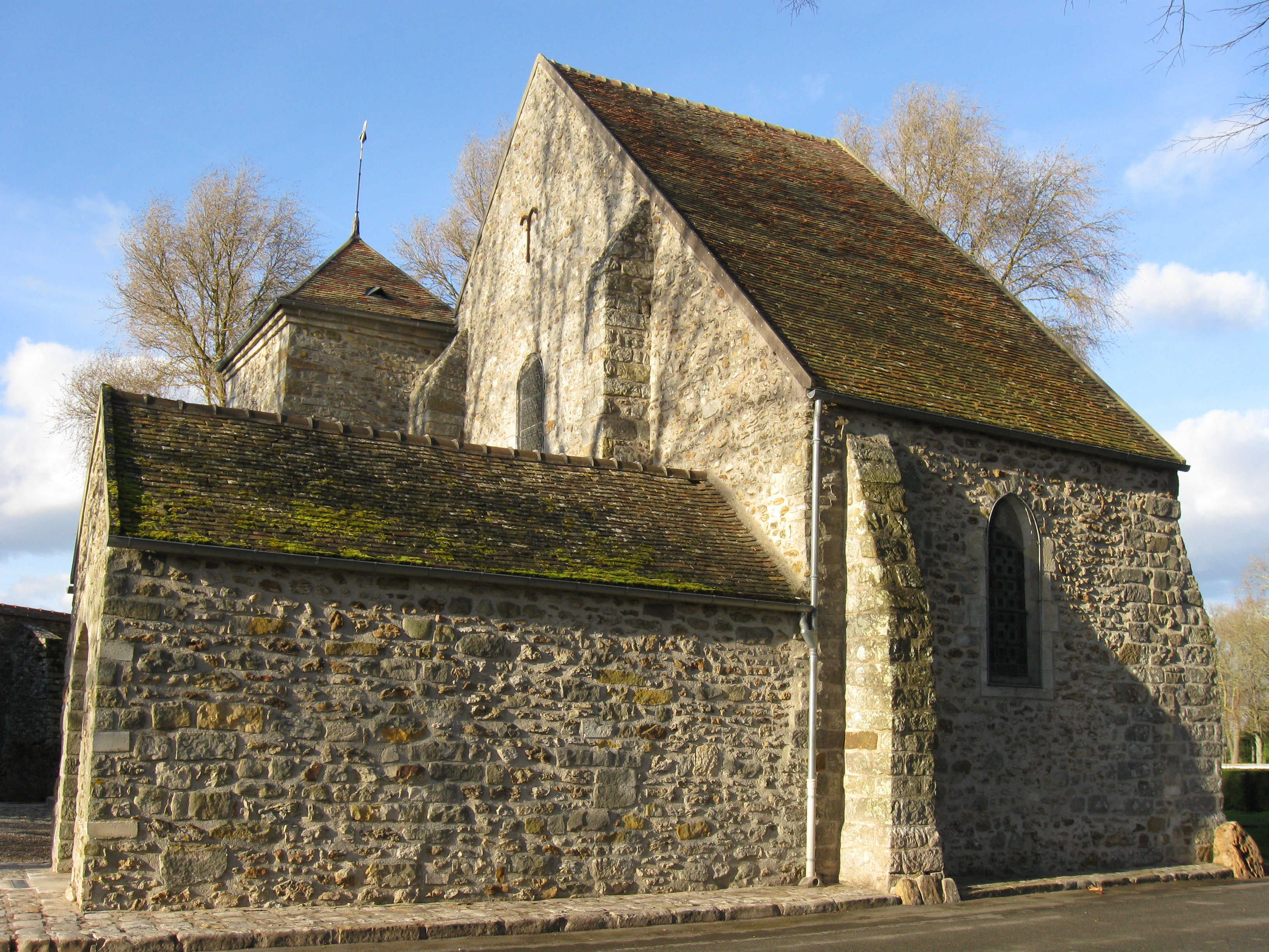 Église Saint-Éloi de Villiers-en-Bière. (Seine-et-Marne, région Île-de-France).